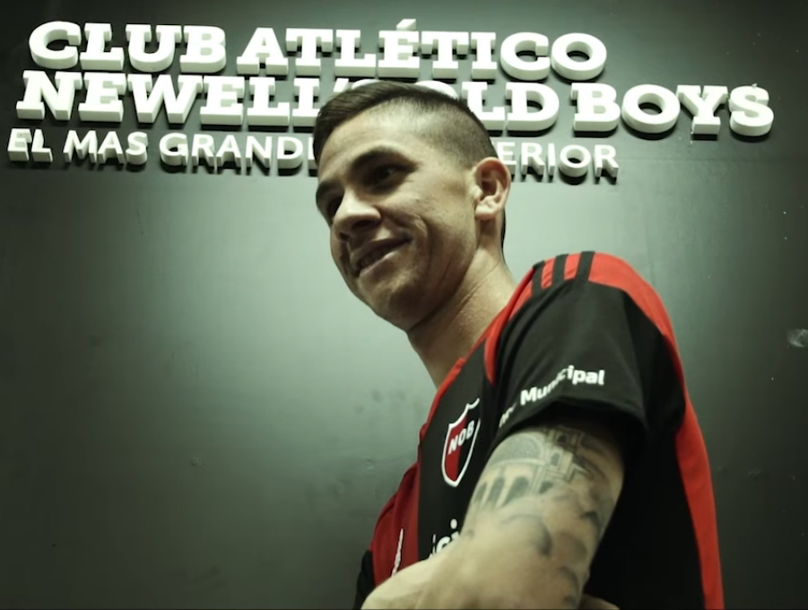 El defensor firmó su contrato por una temporada y dialogó en exclusiva con el sitio oficial.